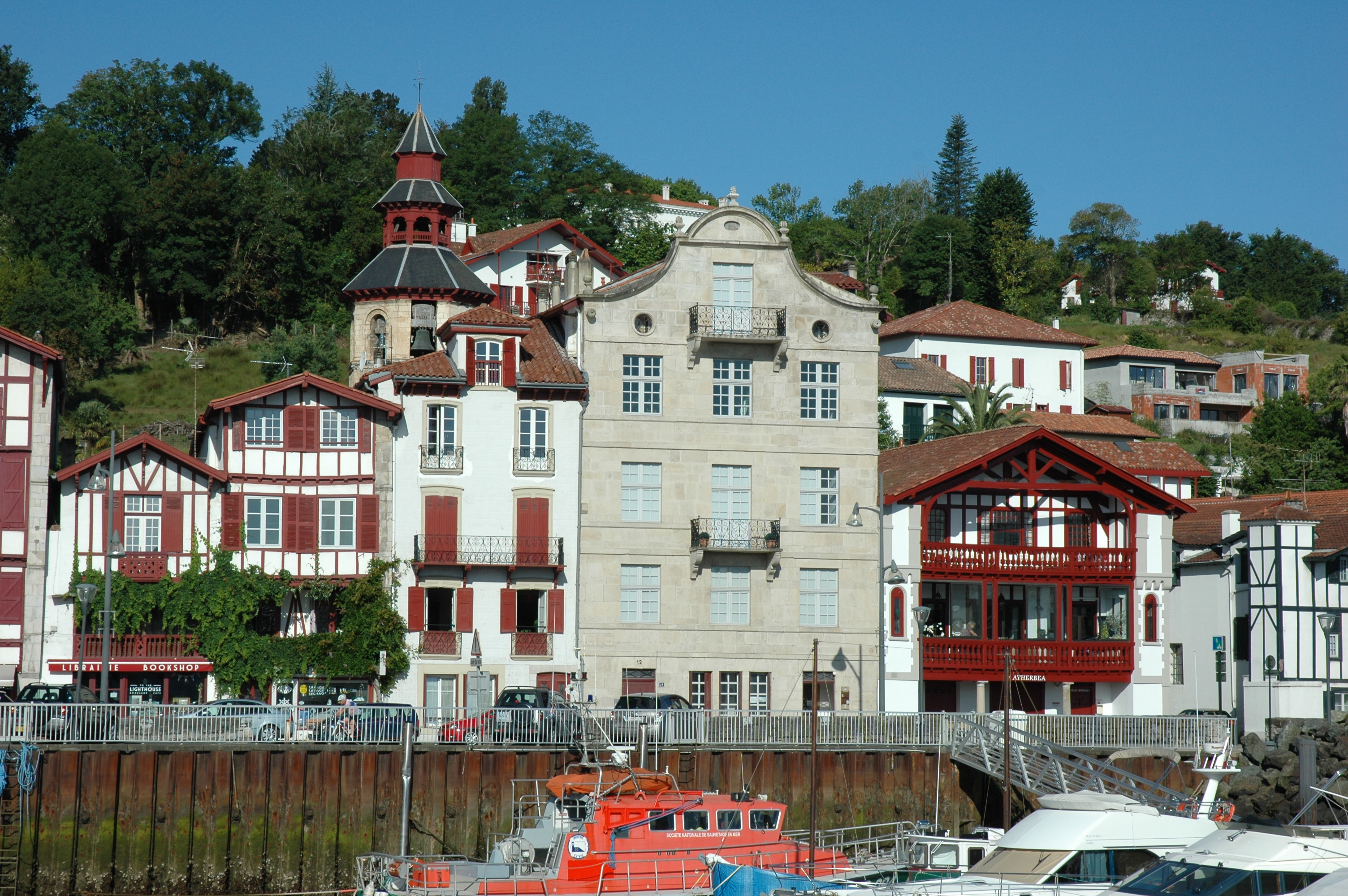 Ciboure